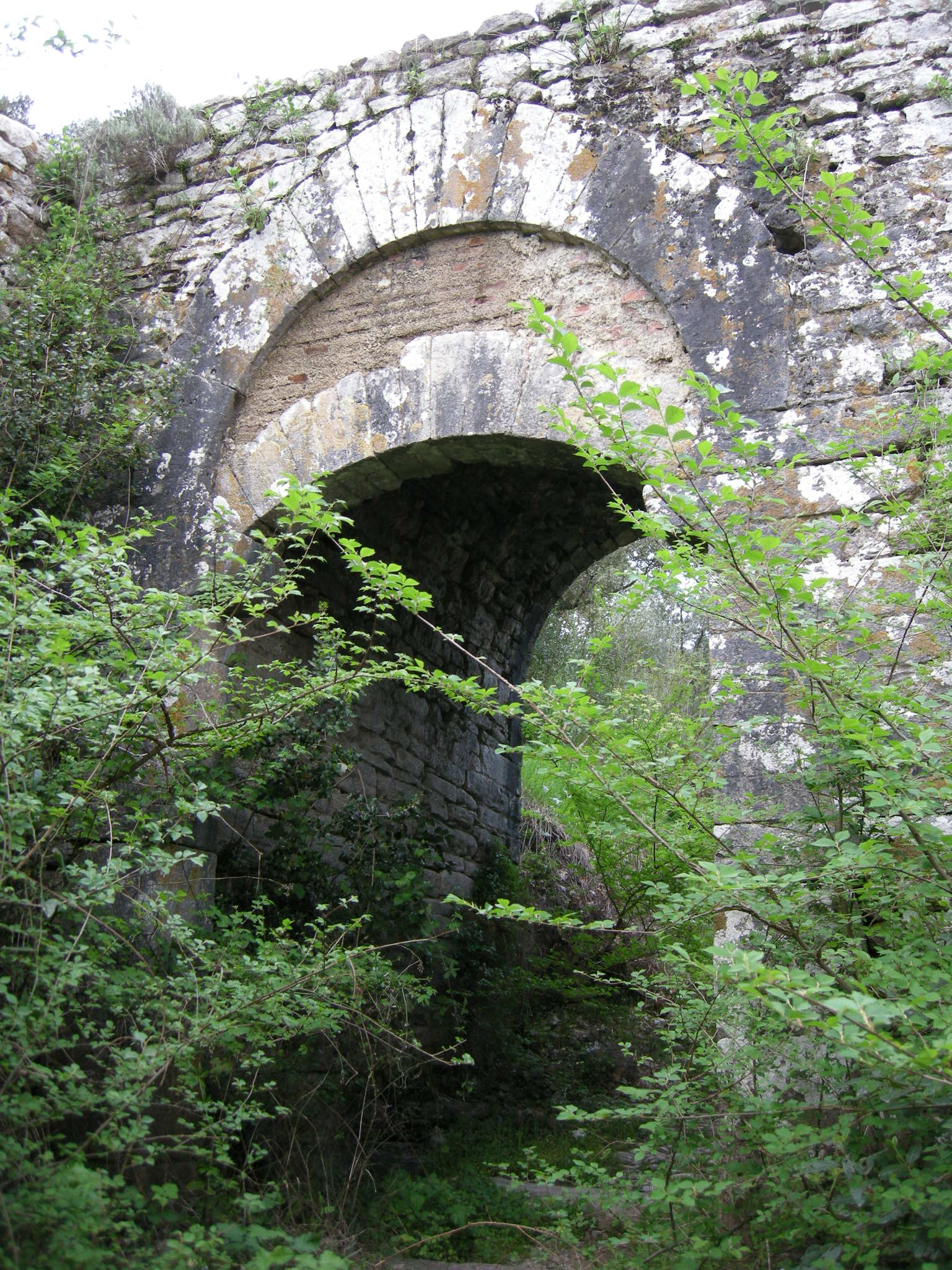 Castello di monsummano alto, arco ovest